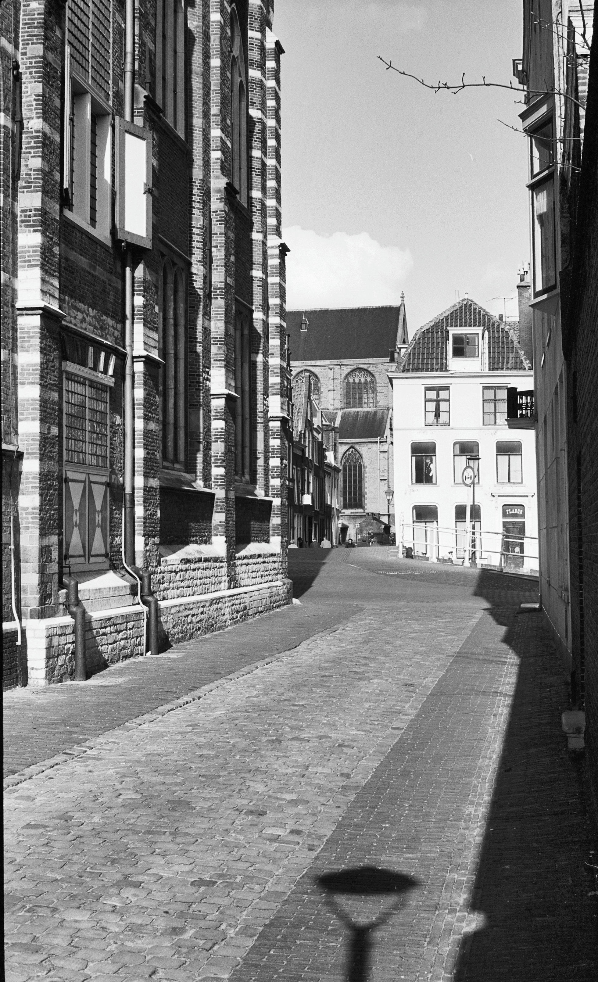 vanuit Nonnensteeg naar Kloksteeg